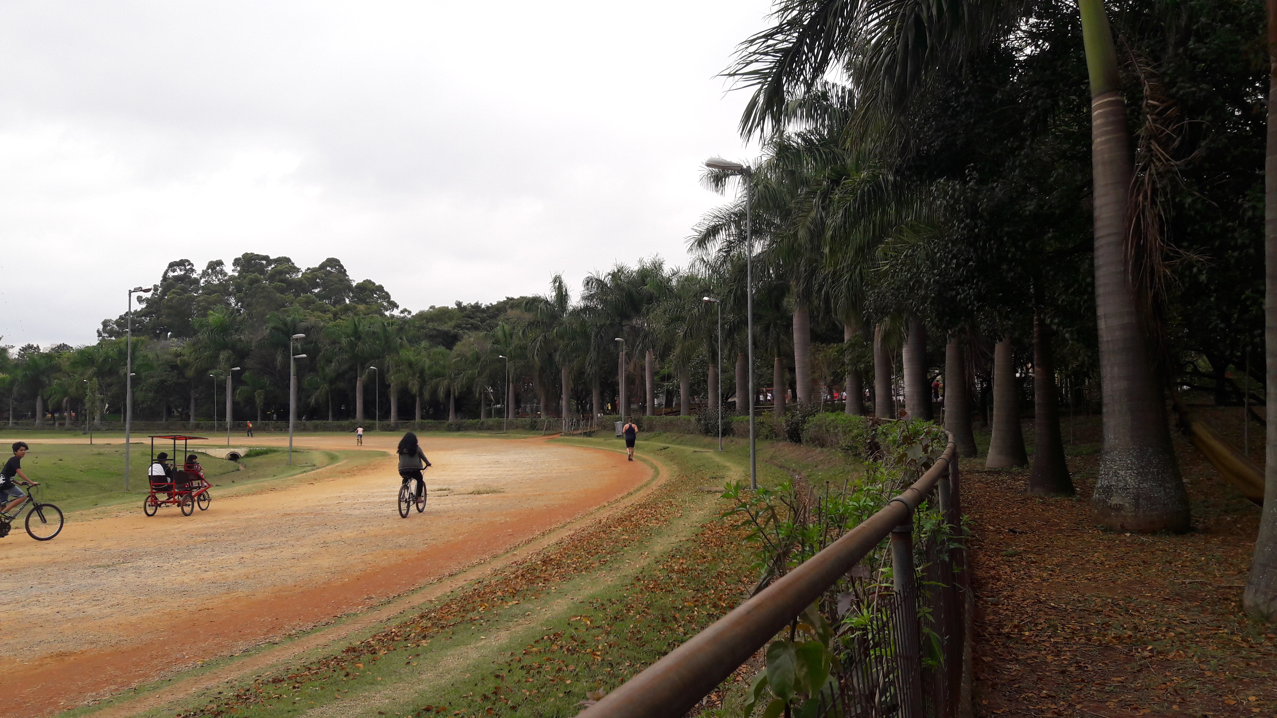 Pista do Parque do Trote, Vila Guilherme, São Paulo, Brasil